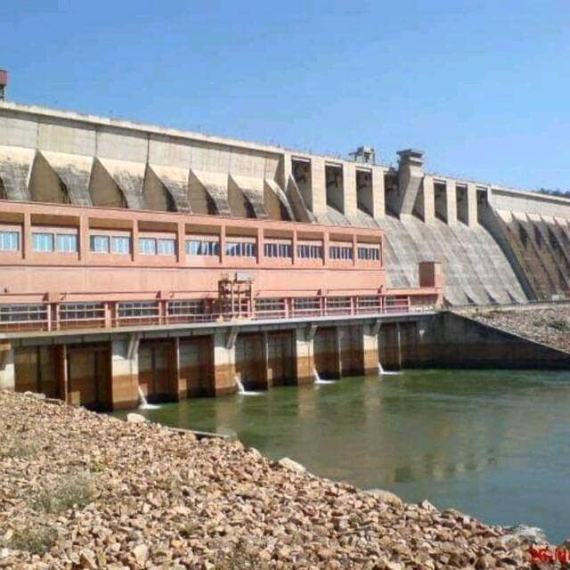 concours wikichallenge écoles d'Afrique 2019